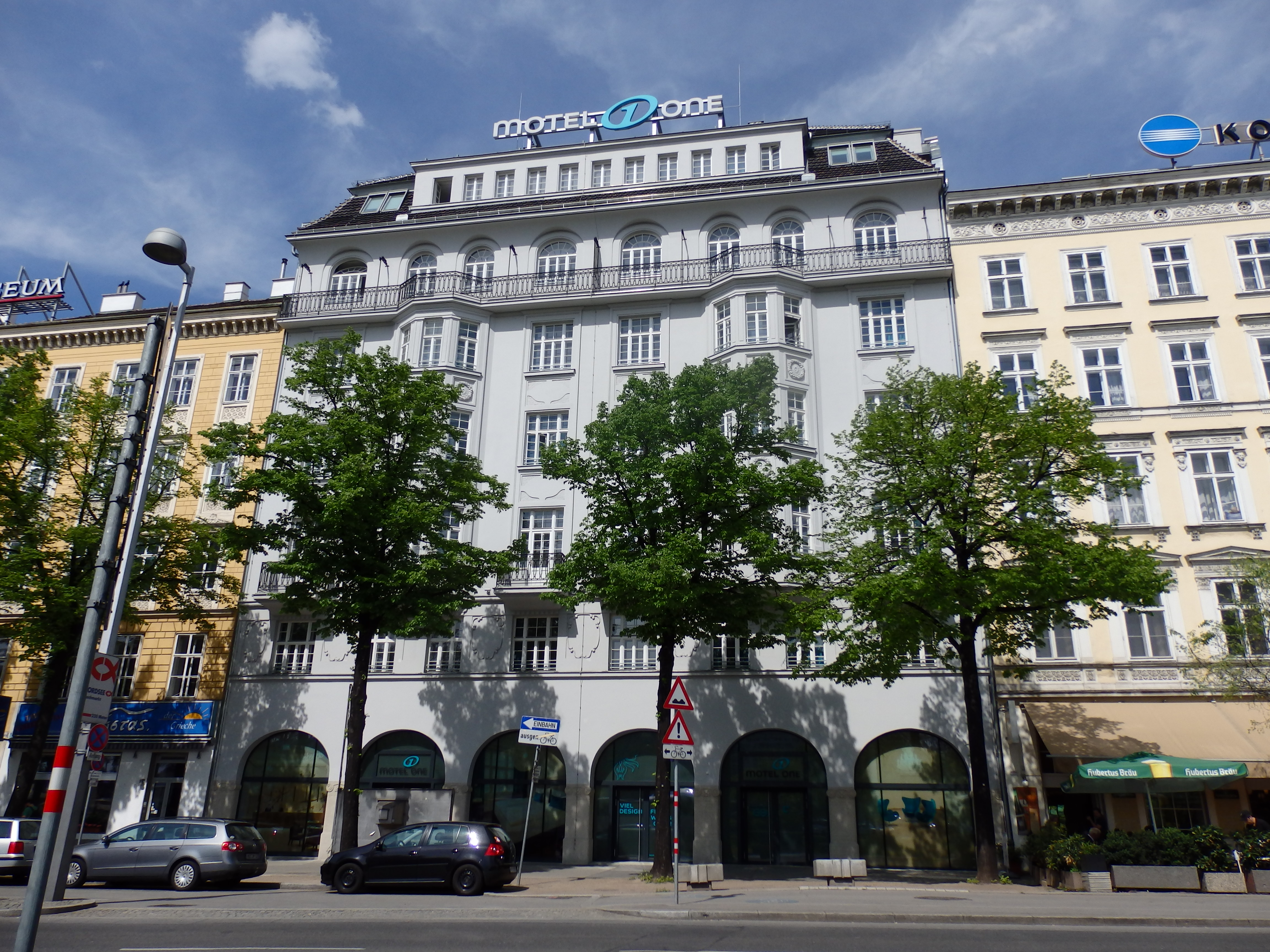 Haus (1912) von Hans Prutscher, Friedrichstraße 4, Wien-Innere Stadt